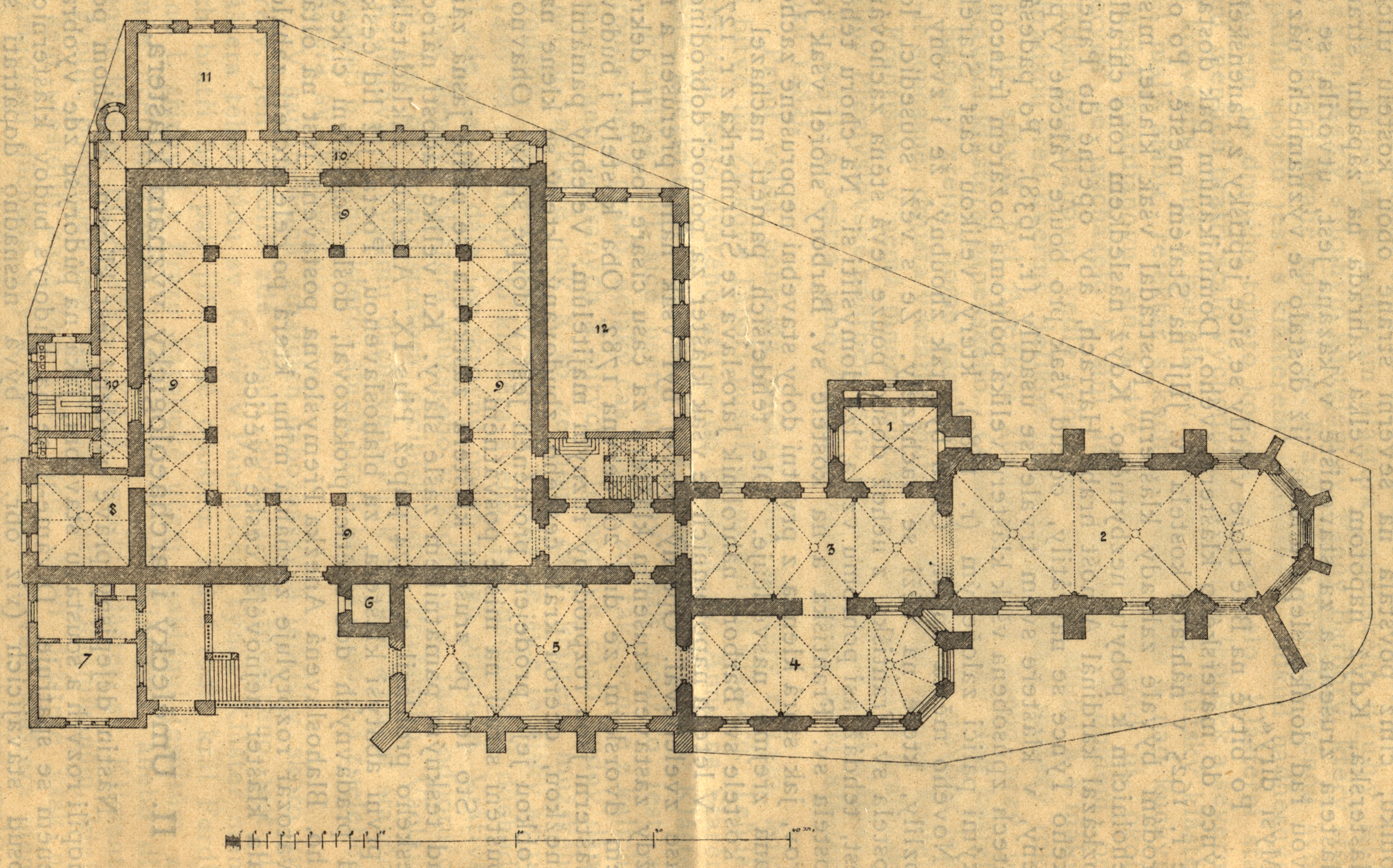 Obrázek I. v knize Klášter Bl. Anežky Přemyslovny a obnova jeho.